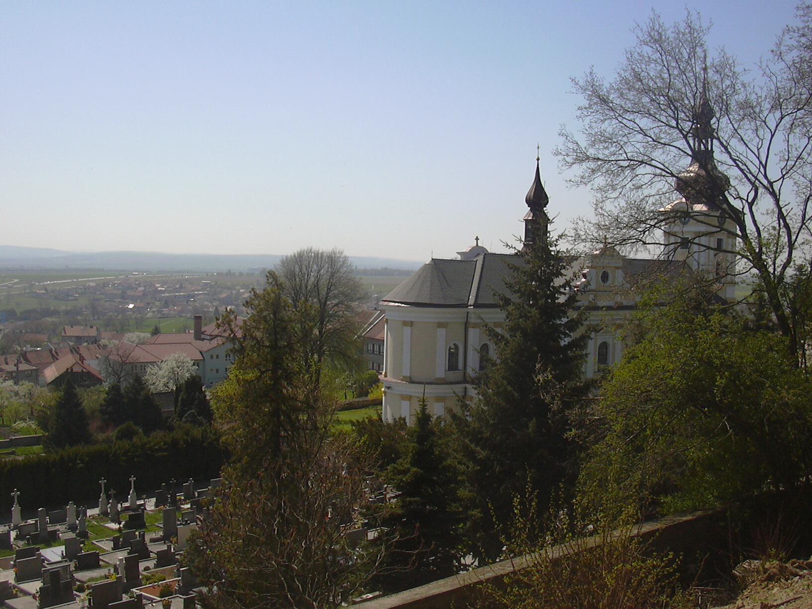 Pustiměř - kostel svatého Benedikta s částí hřbitova (Vyškov District, Czech Republic)